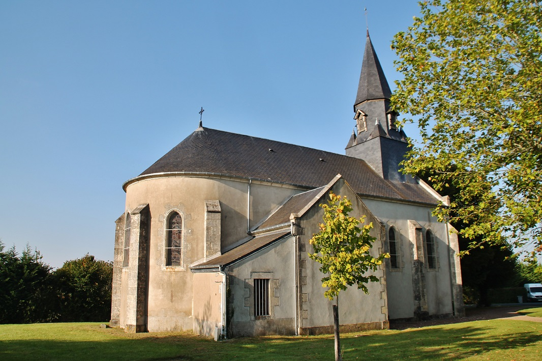 L'église